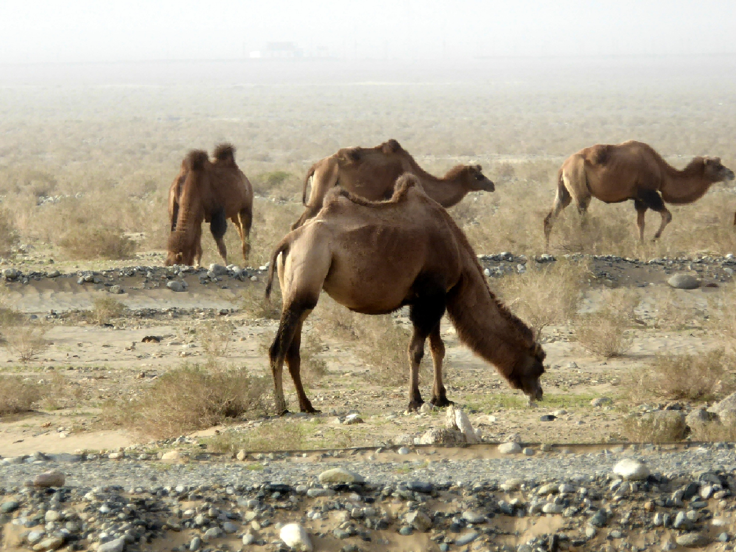 Keriya Hotan Xinjiang China 新疆 和田 于田